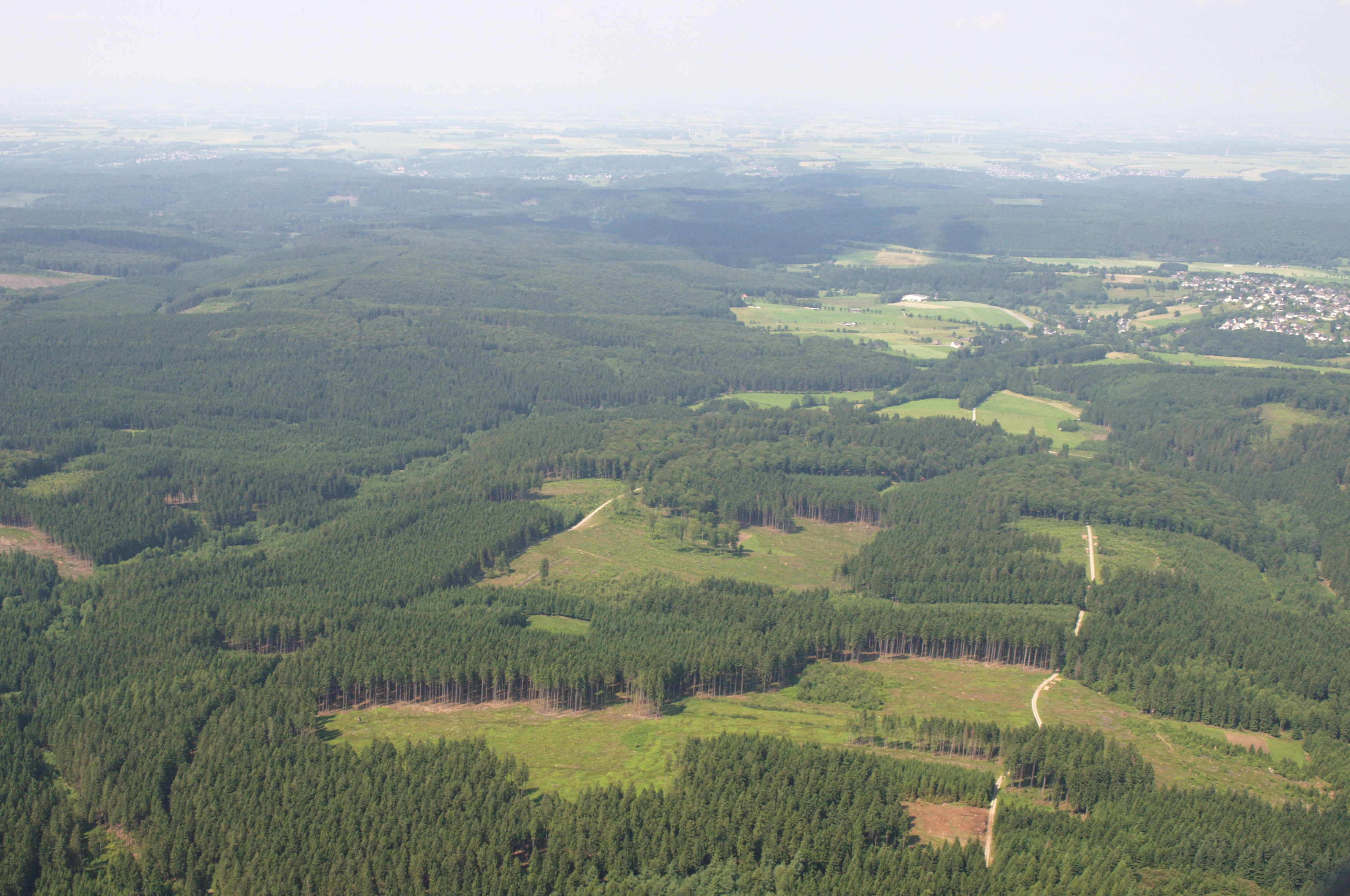 Fotoflug Sauerland-Ost: Blick nach Norden über einen Teil des Naturparks Arnsberger Wald (Bereich Markshagen im Stadtgebiet Warstein) südwestlich von Hirschberg zwischen dem Enster Weg und dem Knickerweg; Bachtal des Wintersiepen; rechts: Naturschutzgebiet Arnsberger Wald; rechts angeschnitten: Hirschberg